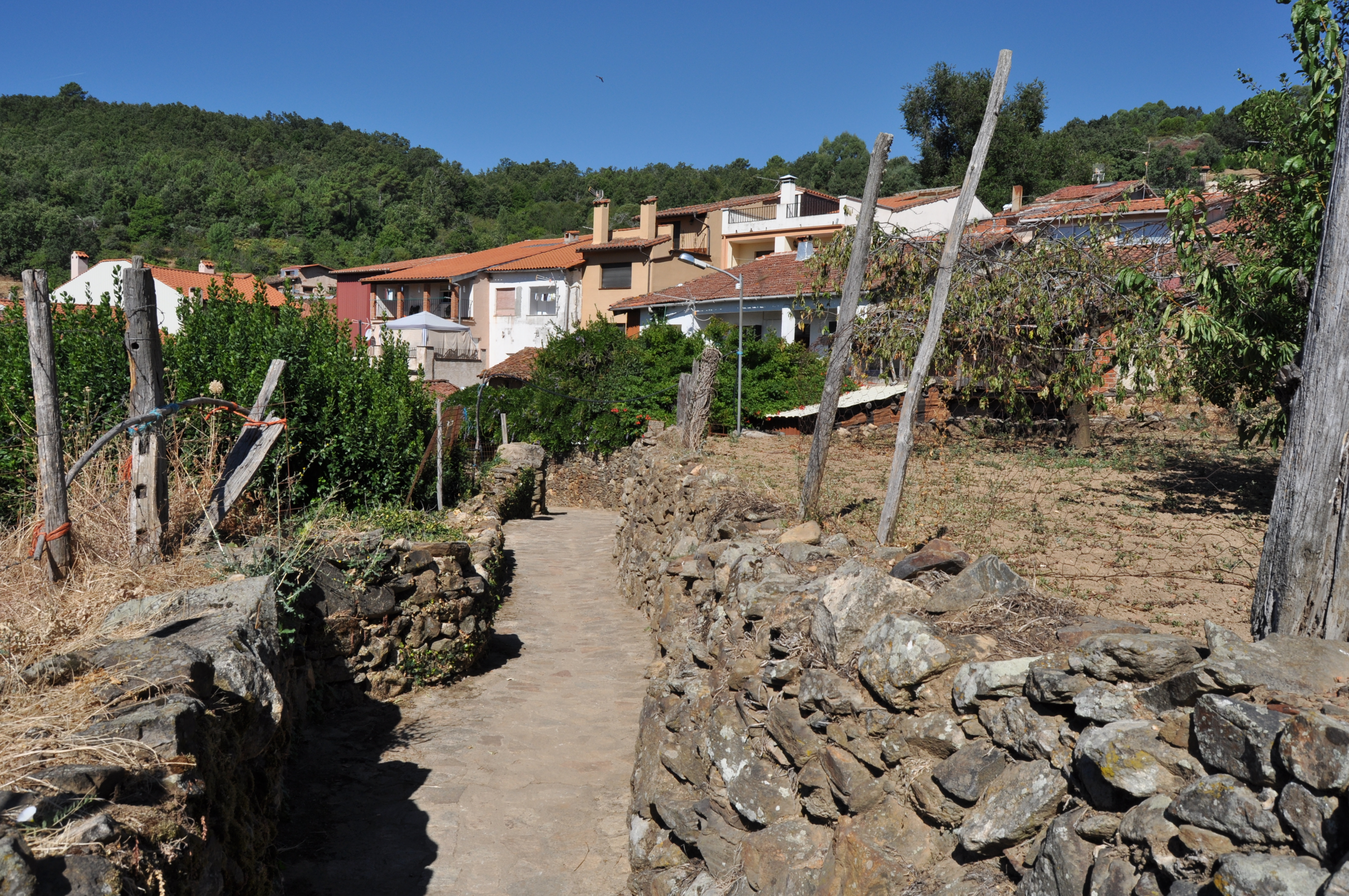 Villanueva del Conde - 011